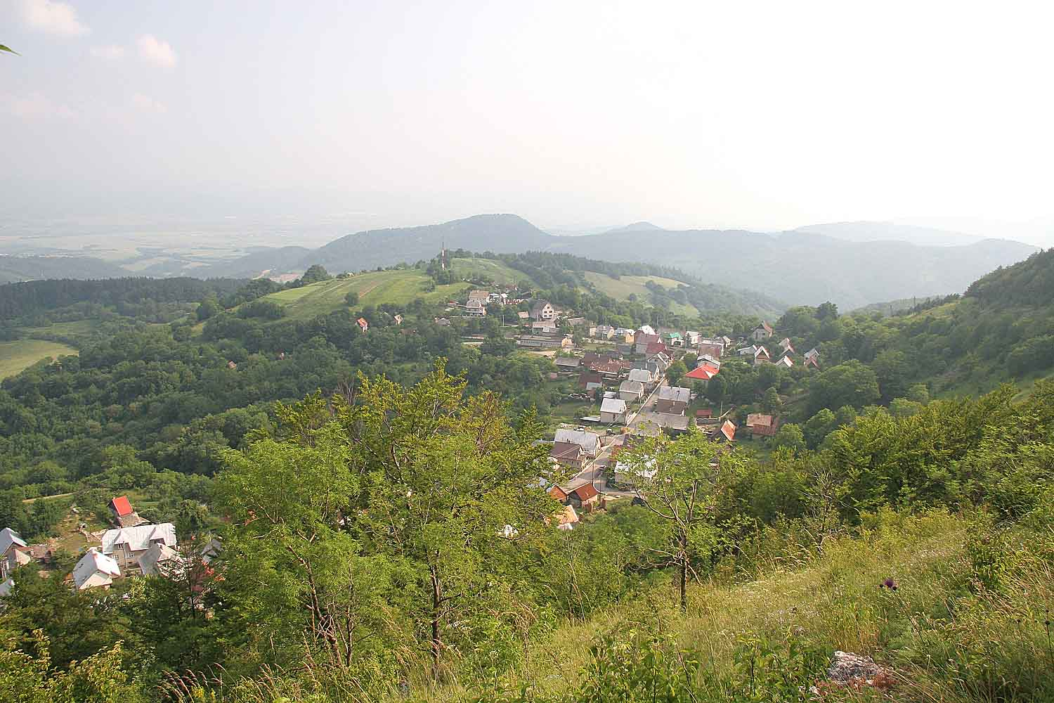 Vršatecké Podhradie, district Ilava, Slovakia author: Prazak Date: 26. 6. 2006